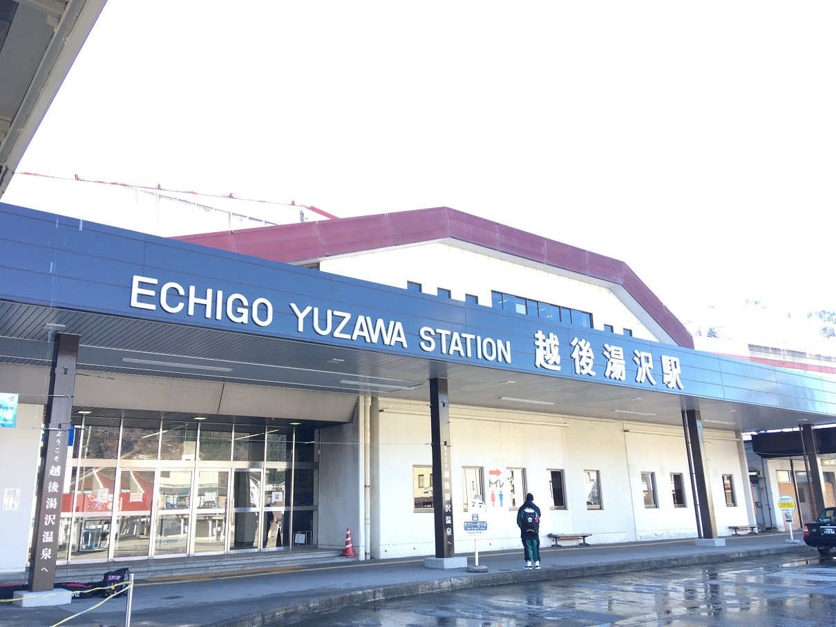 越後湯沢駅西口駅舎